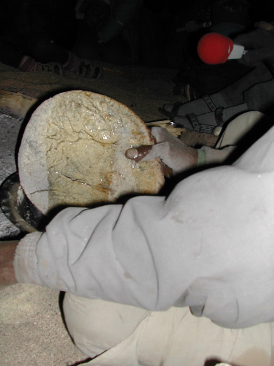 Puit Algérie